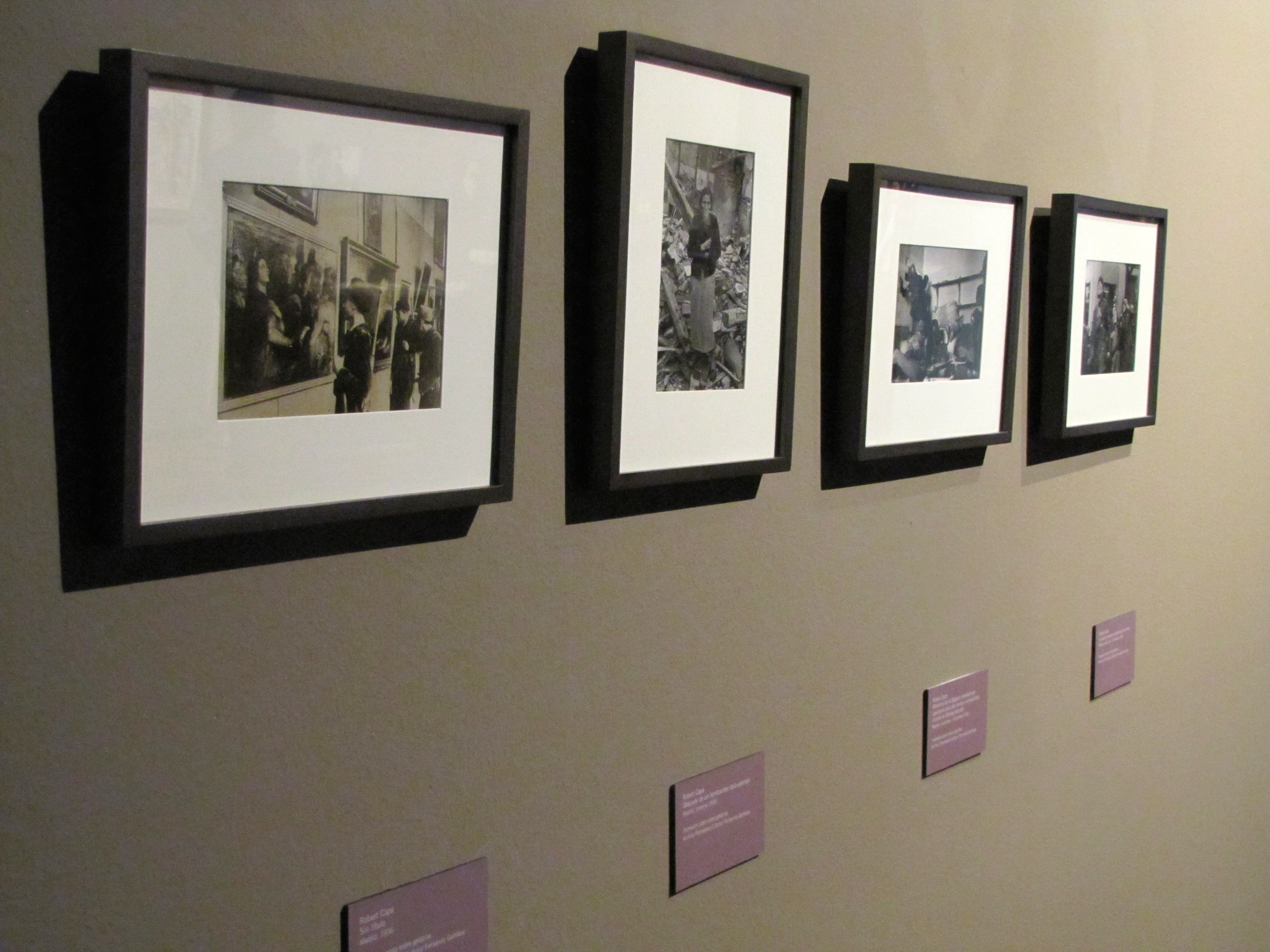 Fotografías del periodista húngaro que muestran la vida de los españoles durante la Guerra Civil.